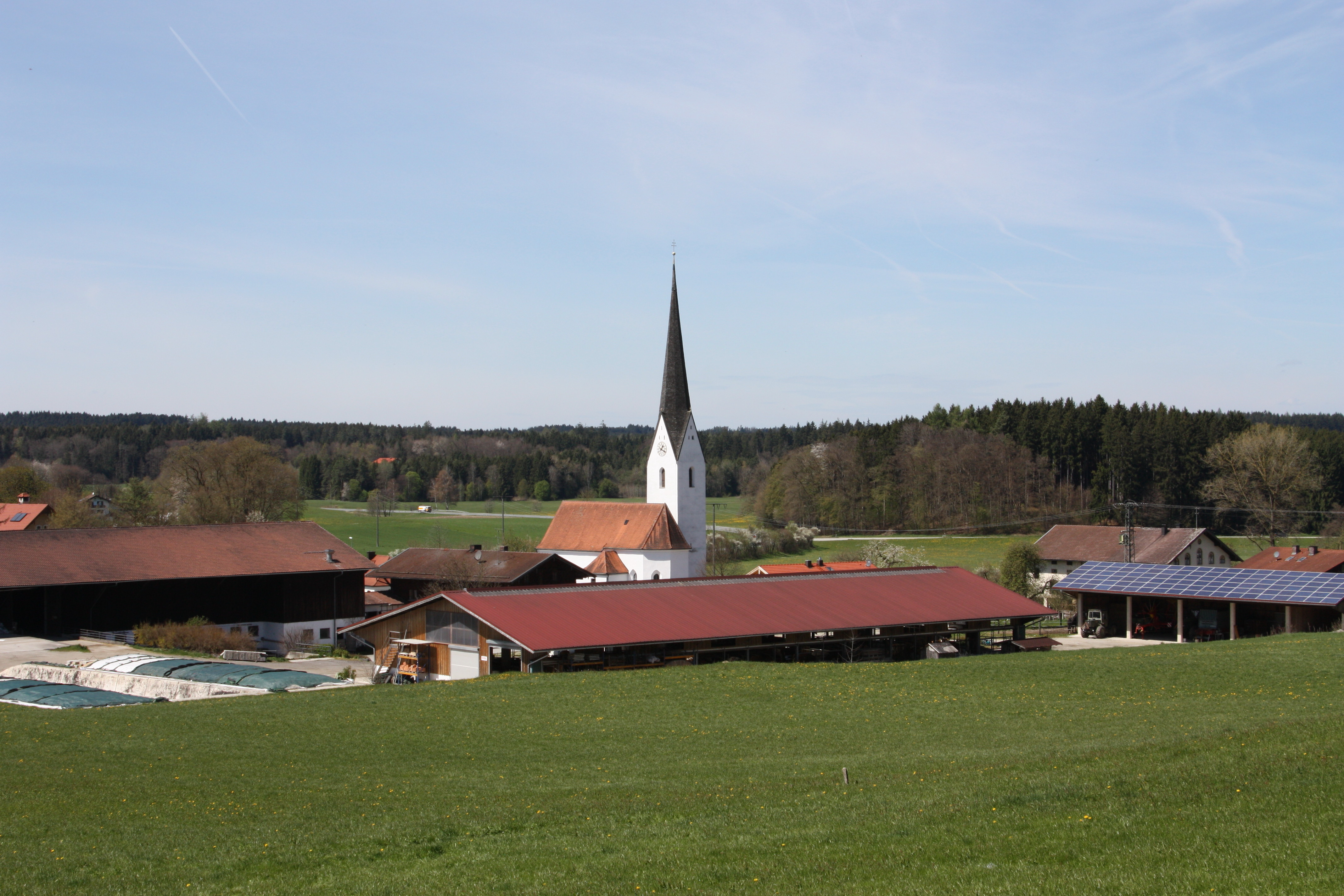 Amerang OT Kirchensur